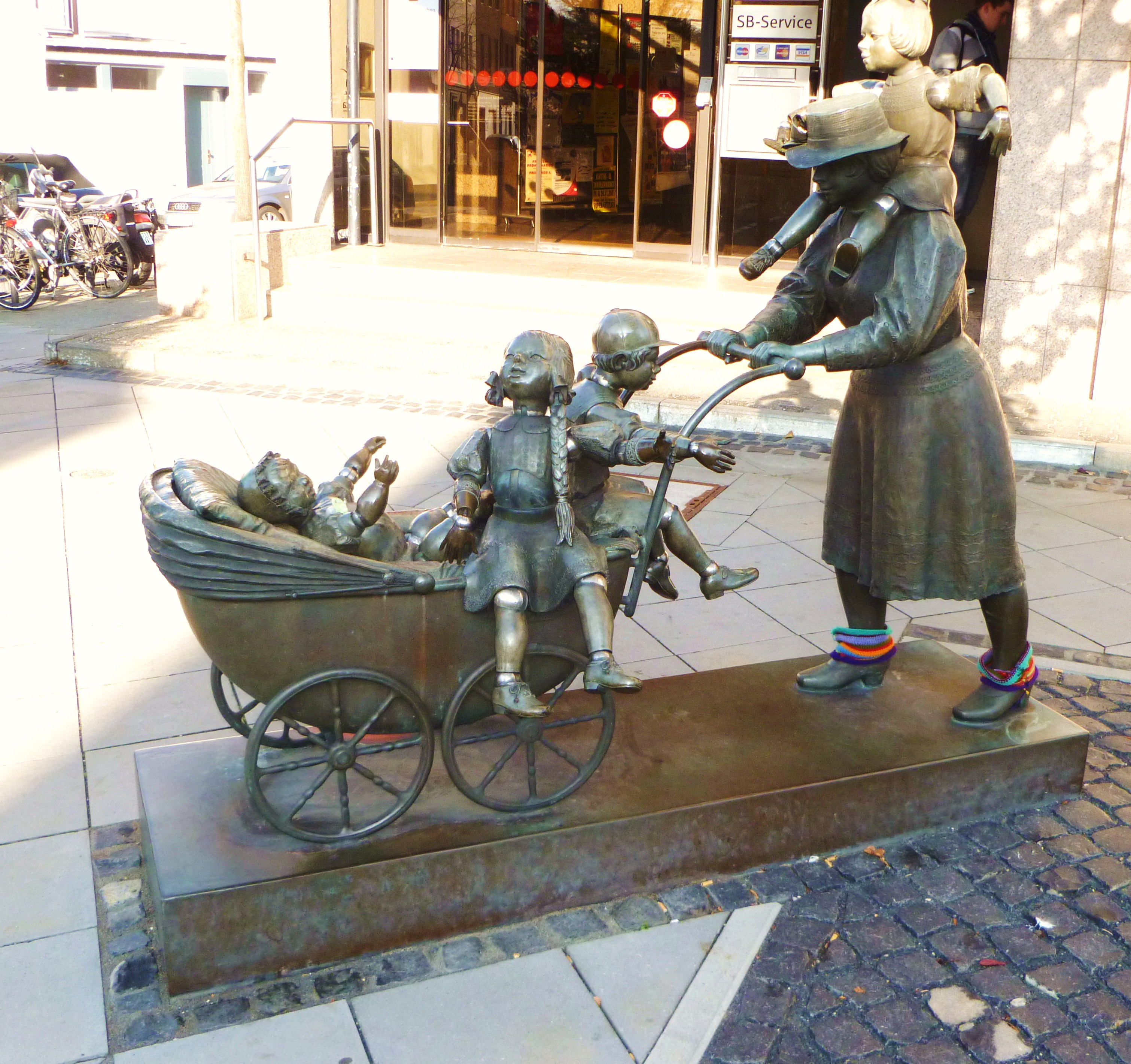 Skulptur "mit Kind und Kegel", Trierer Straße Aachen-Brand, Bonifatius Stirnberg